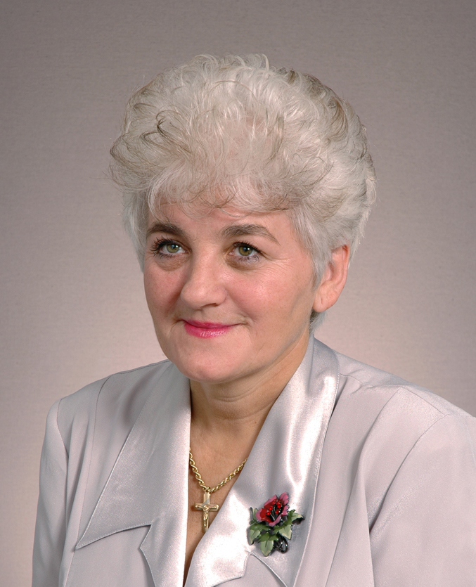 Senator Janina Fetlińska